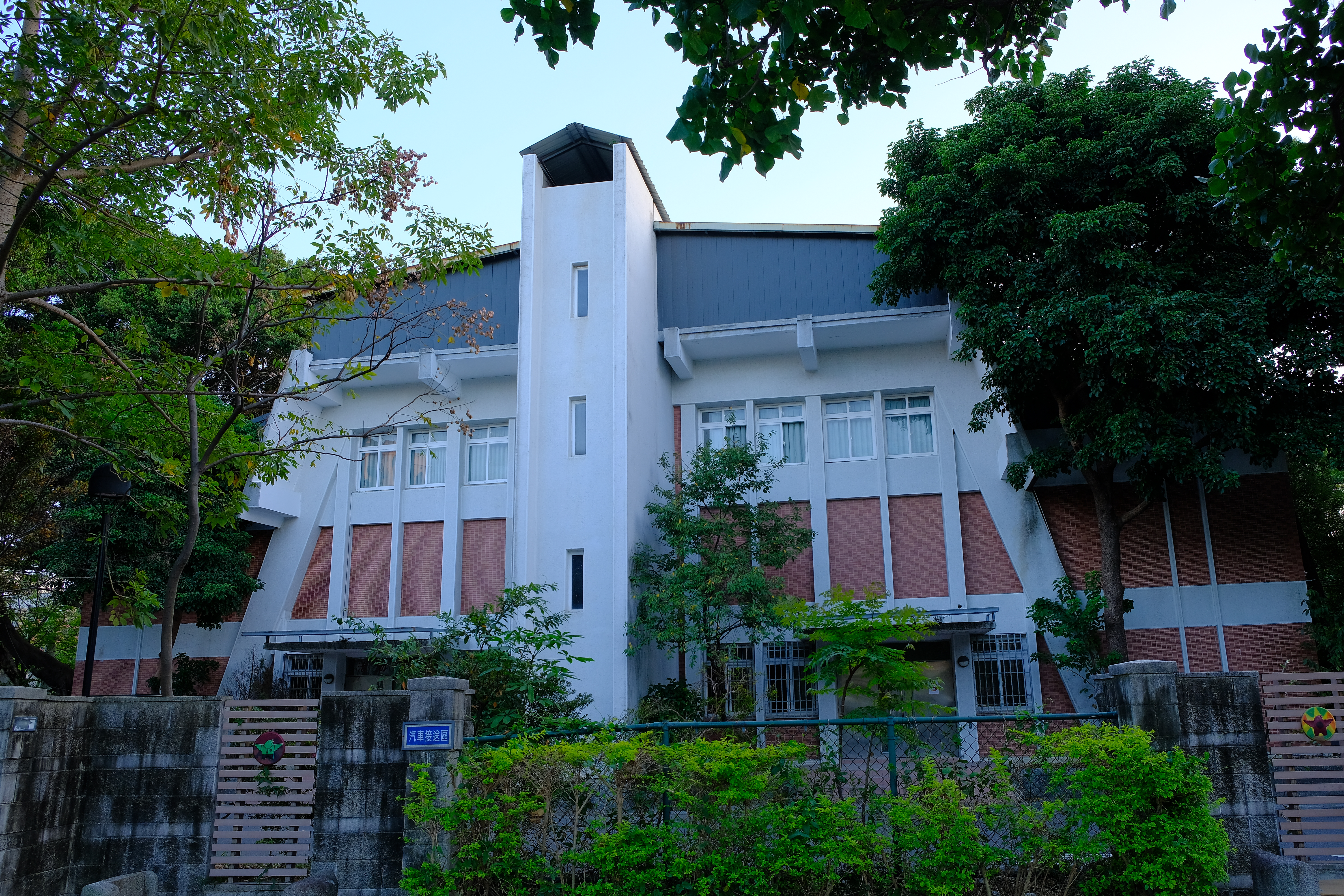 2019 萬華國中活動中心 The Student Activity Center of Wan-Hua Junior High School